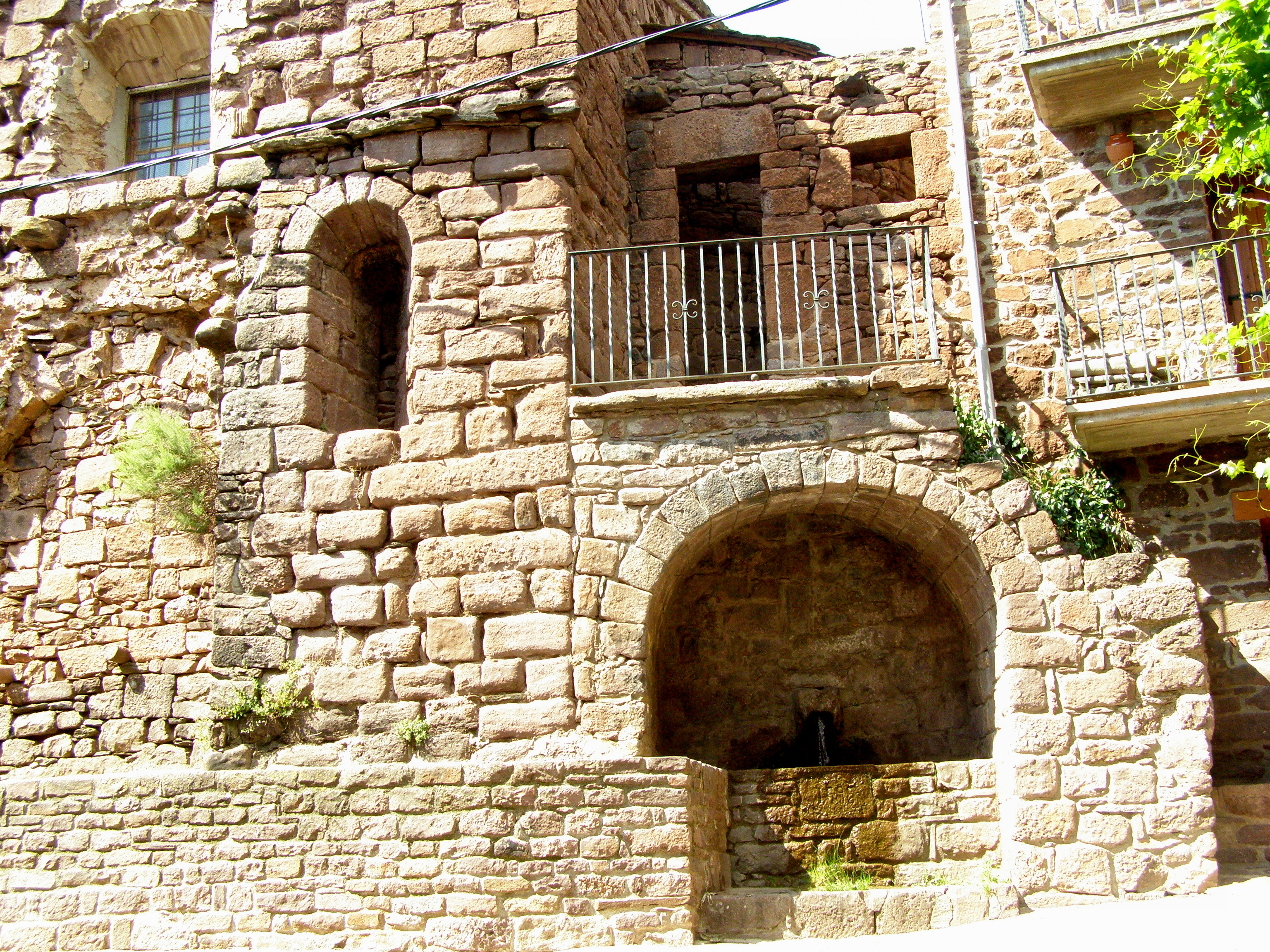 Antiga capella de la Mare de Déu del Roser, actualment un safareig públic, al poble de Vilamur, municipi de Soriguera. Esta foto participó en el juego En un lugar de flickr... .